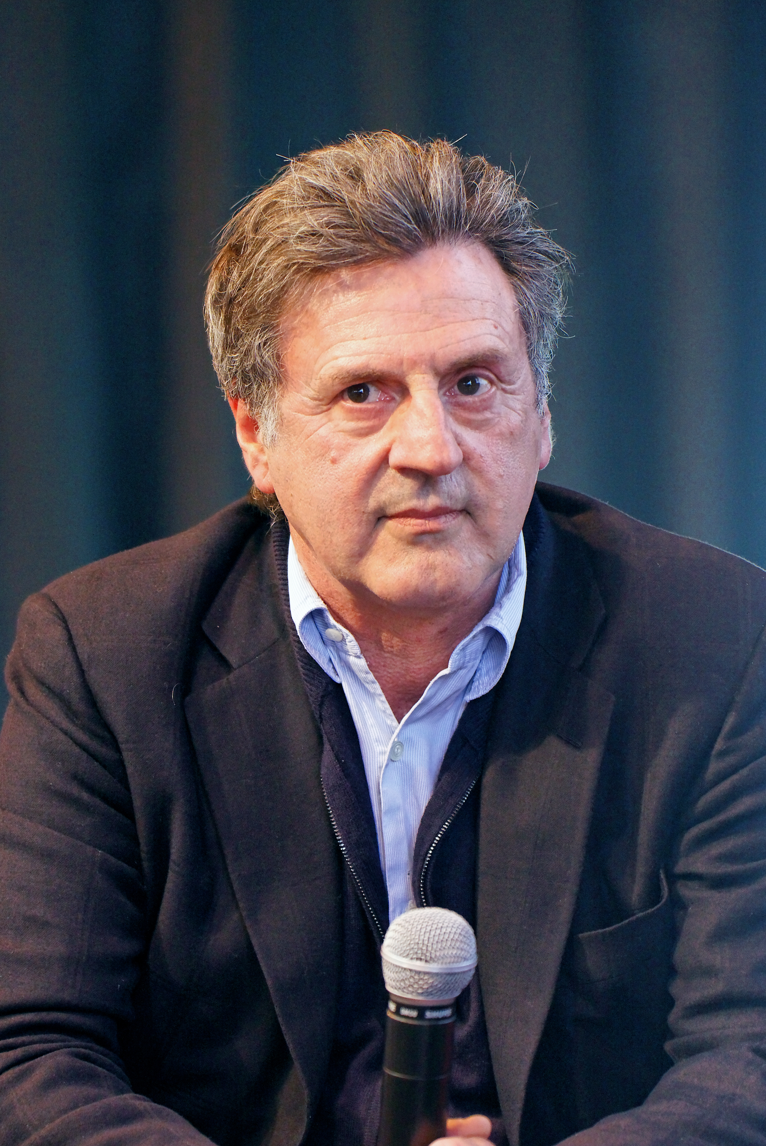 Daniel Auteuil lors du salon du livre de Paris 2011.